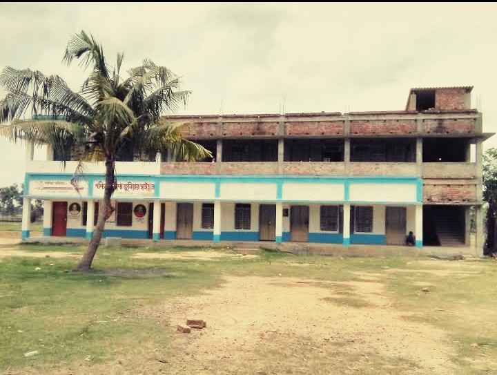 Government school